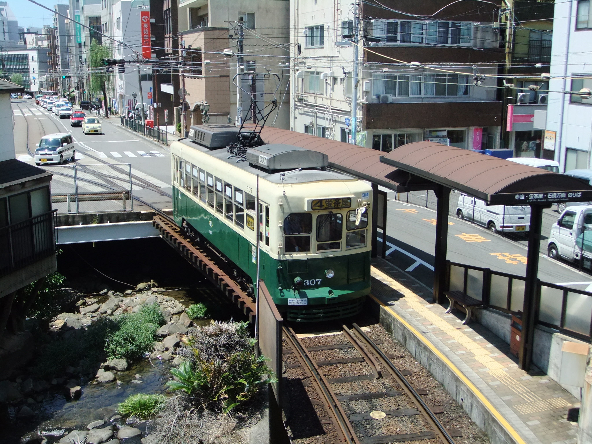 正覚寺下電停